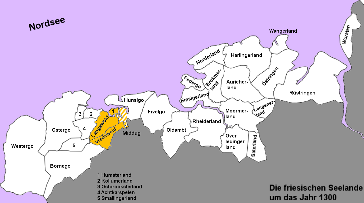 Karte der freien friesischen Seelande (Landesgemeinden) von der Zuiderzee bis zur Weser in den Grenzen um das Jahr 1300; die Landschaften, die später das Westerkwartier bildeten sind hervorgehoben, das später vom Hunsigo an das Westerkwartier angeschlossene Middag ist schraffiert. (Karte ohne Inseln.)